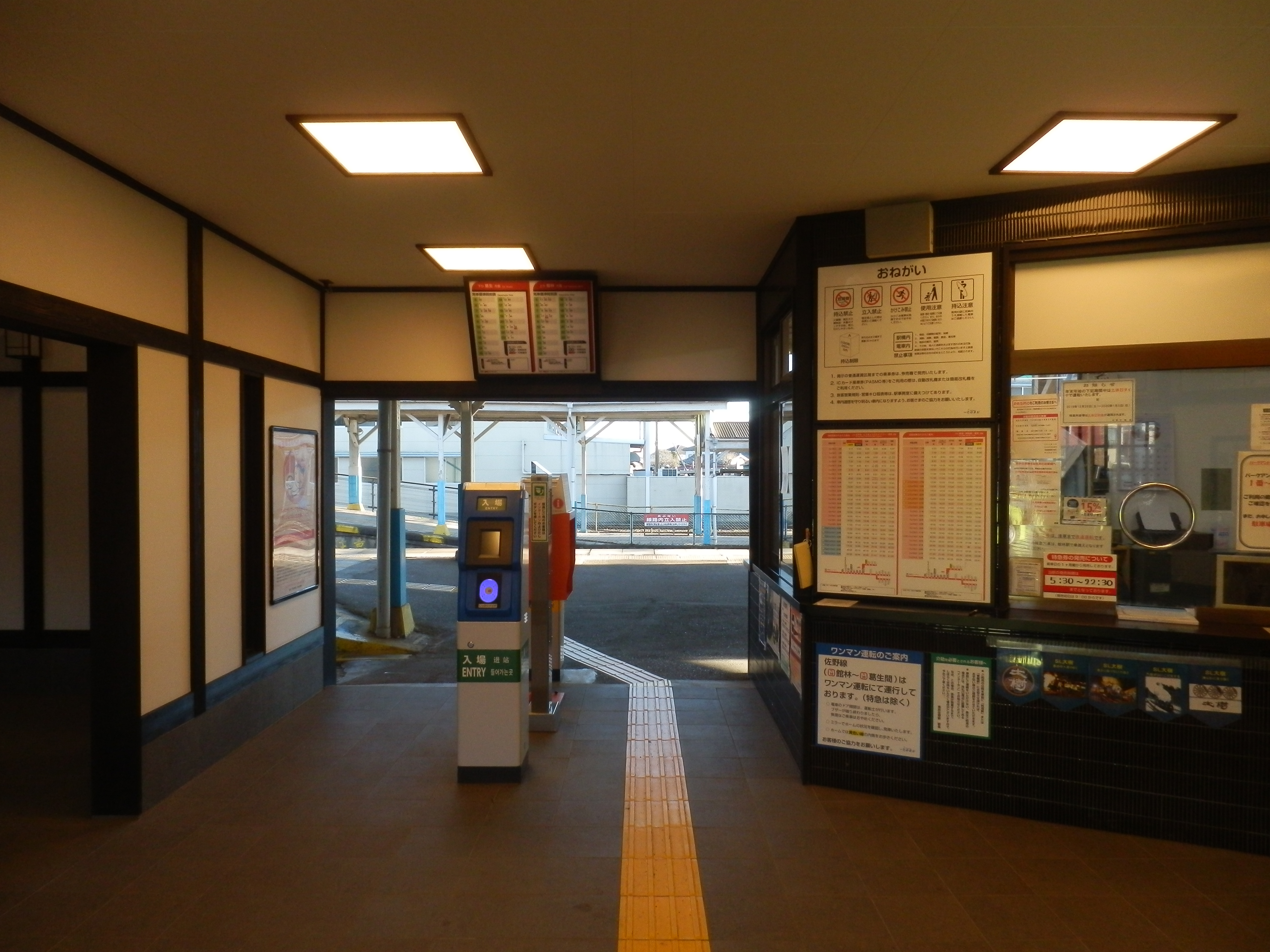 佐野市駅改札口